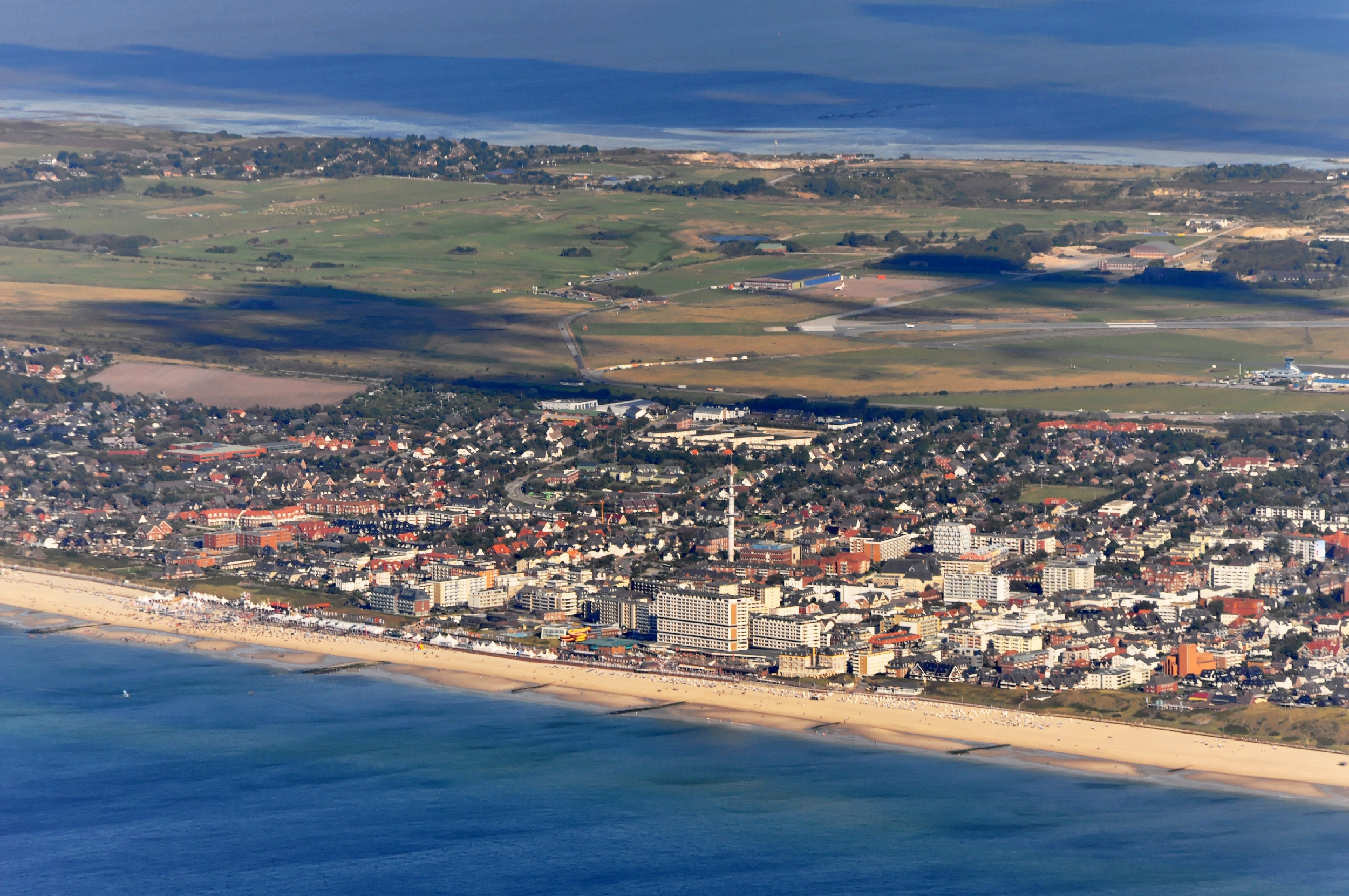 Luftaufnahmen Nordseekueste 2013-09